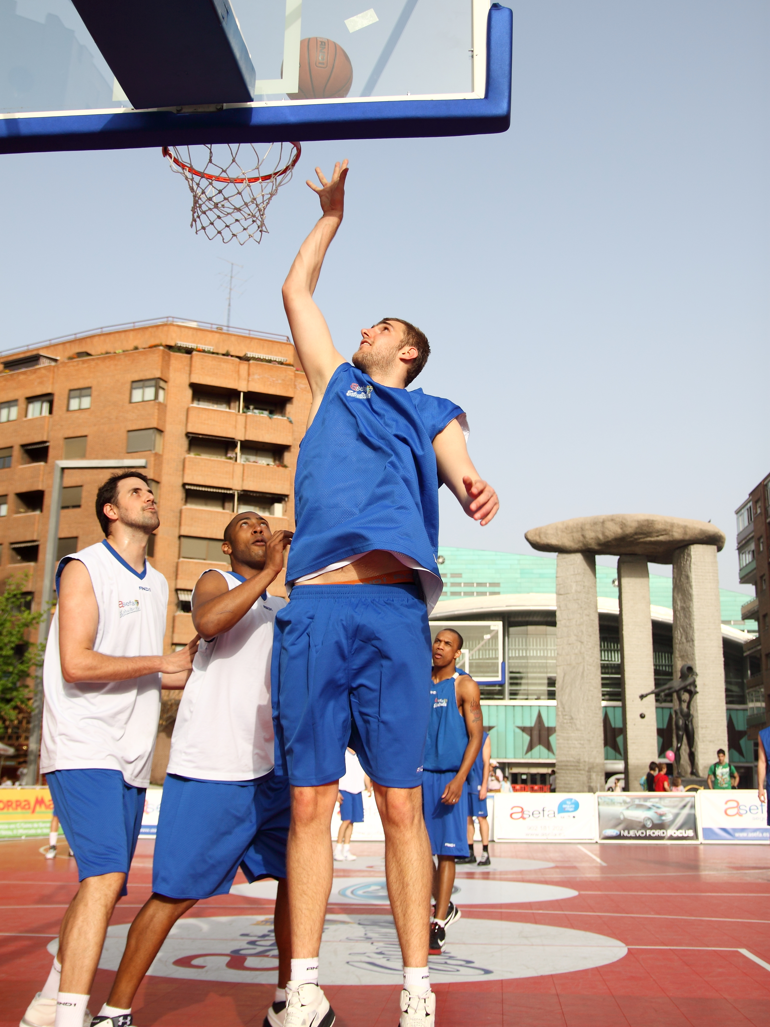 De izquierda a derecha: Germán Gabriel (camiseta blanca), Jayson Granger (camiseta blanca) y Yannik Driesen (camiseta azul). Jugadores del Club Baloncesto Estudiantes, Madrid.